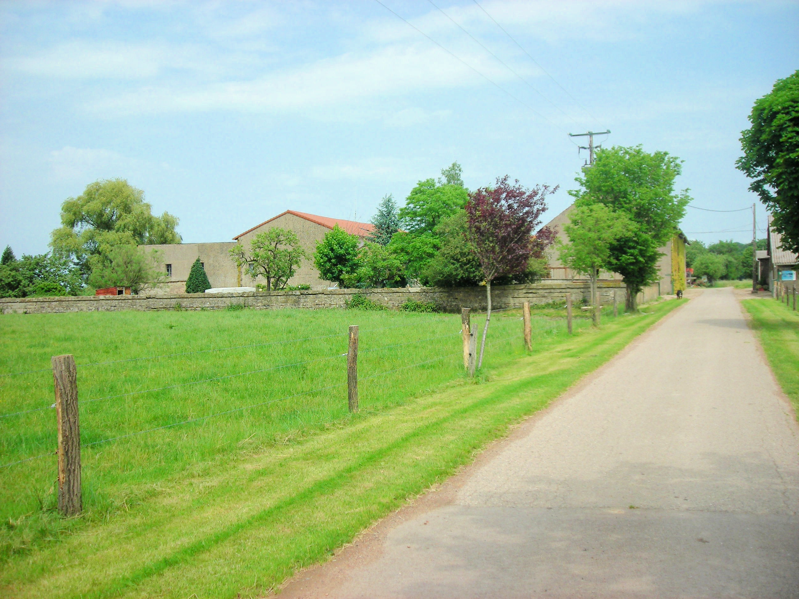 Ferme Saint-Nicolas à Guerting (Lorraine, France)